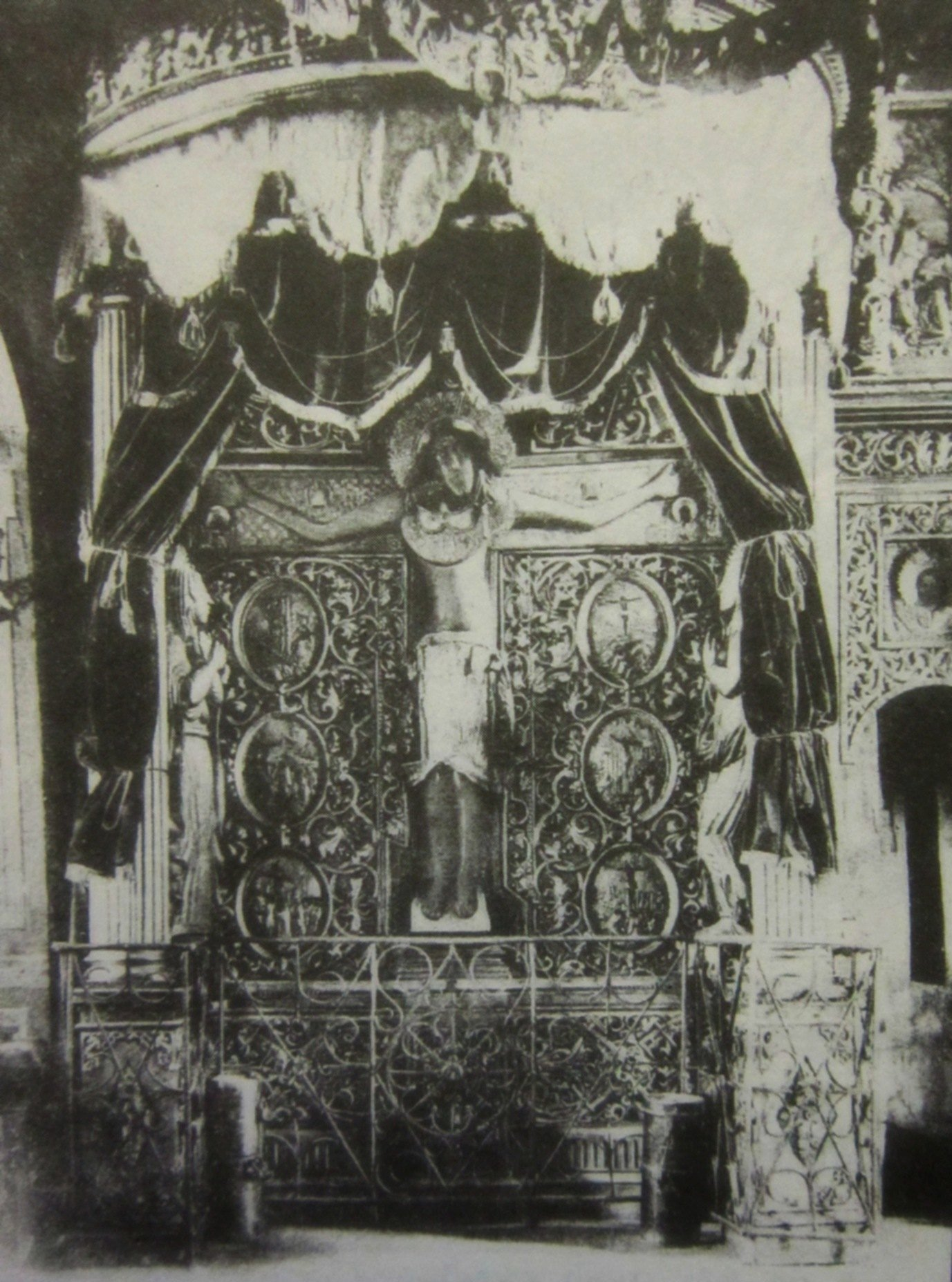 Интерьер Никольской церкви в Ростове-на-Дону